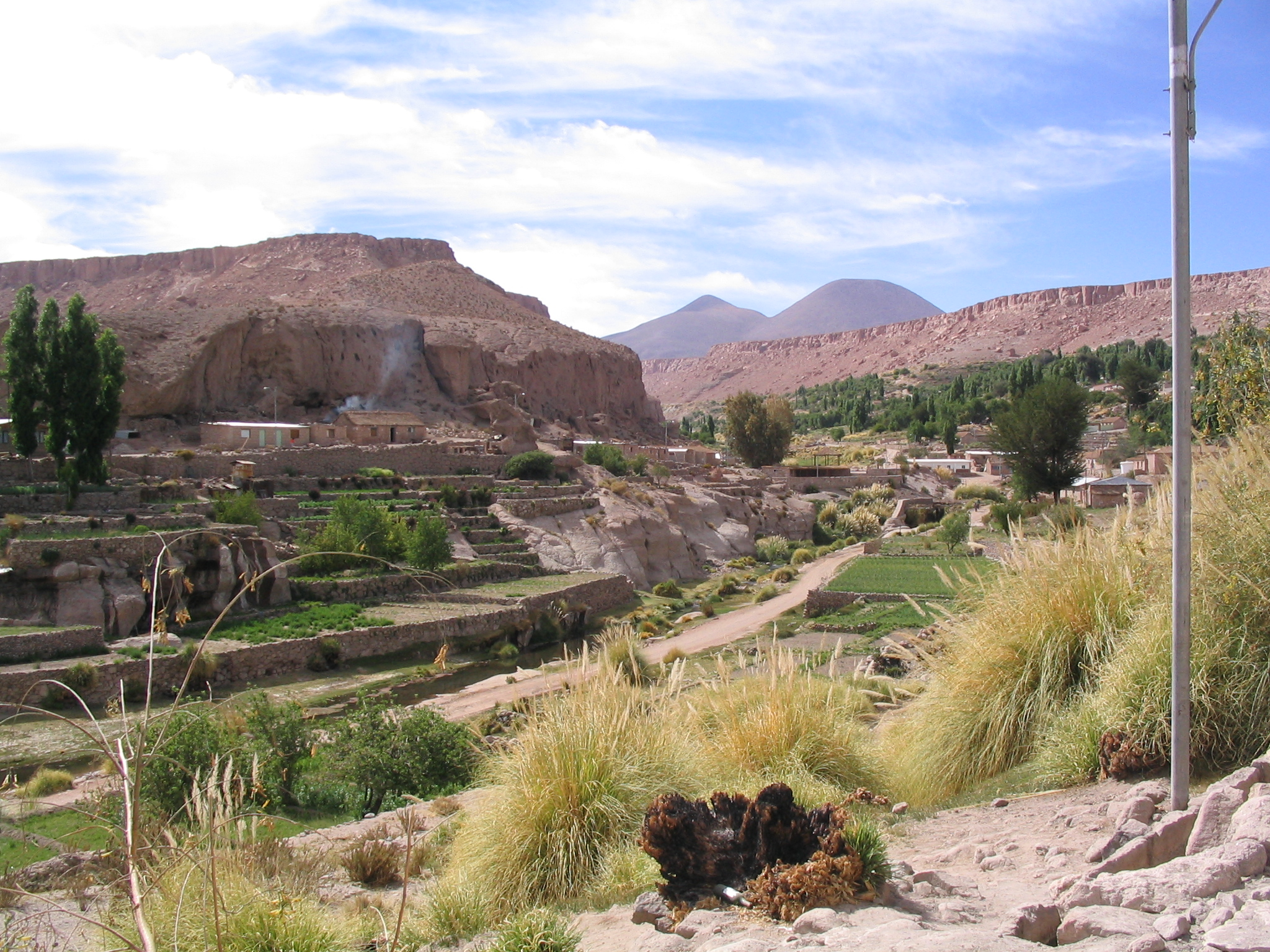 Caspana, Chile.